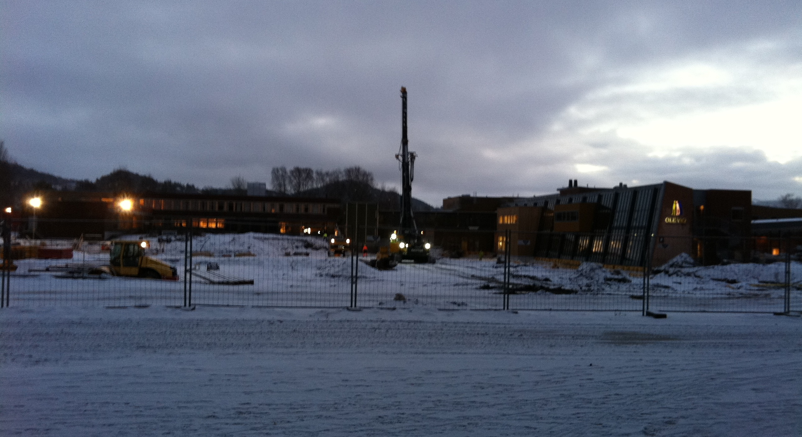 Norsk (bokmål): Ole Vig videregående skole i Stjørdal. Anleggsarbeid i forbindelse med byggingen av den nye Stjørdalshallen i forgrunnen.